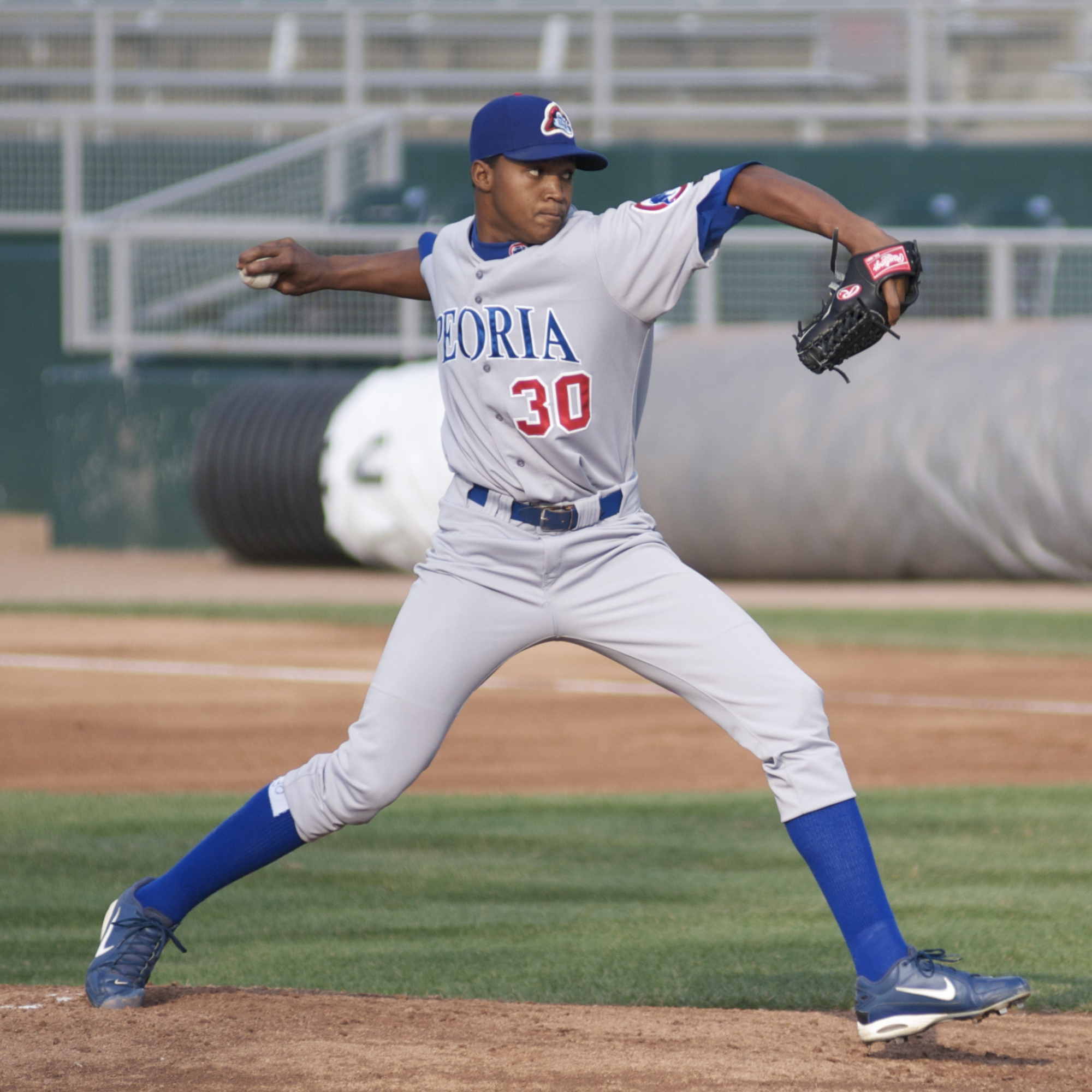 Alberto Cabrera